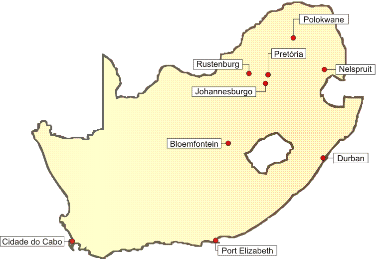 Ilustração da localidade das sedes da Copa de 2010 na África do Sul.